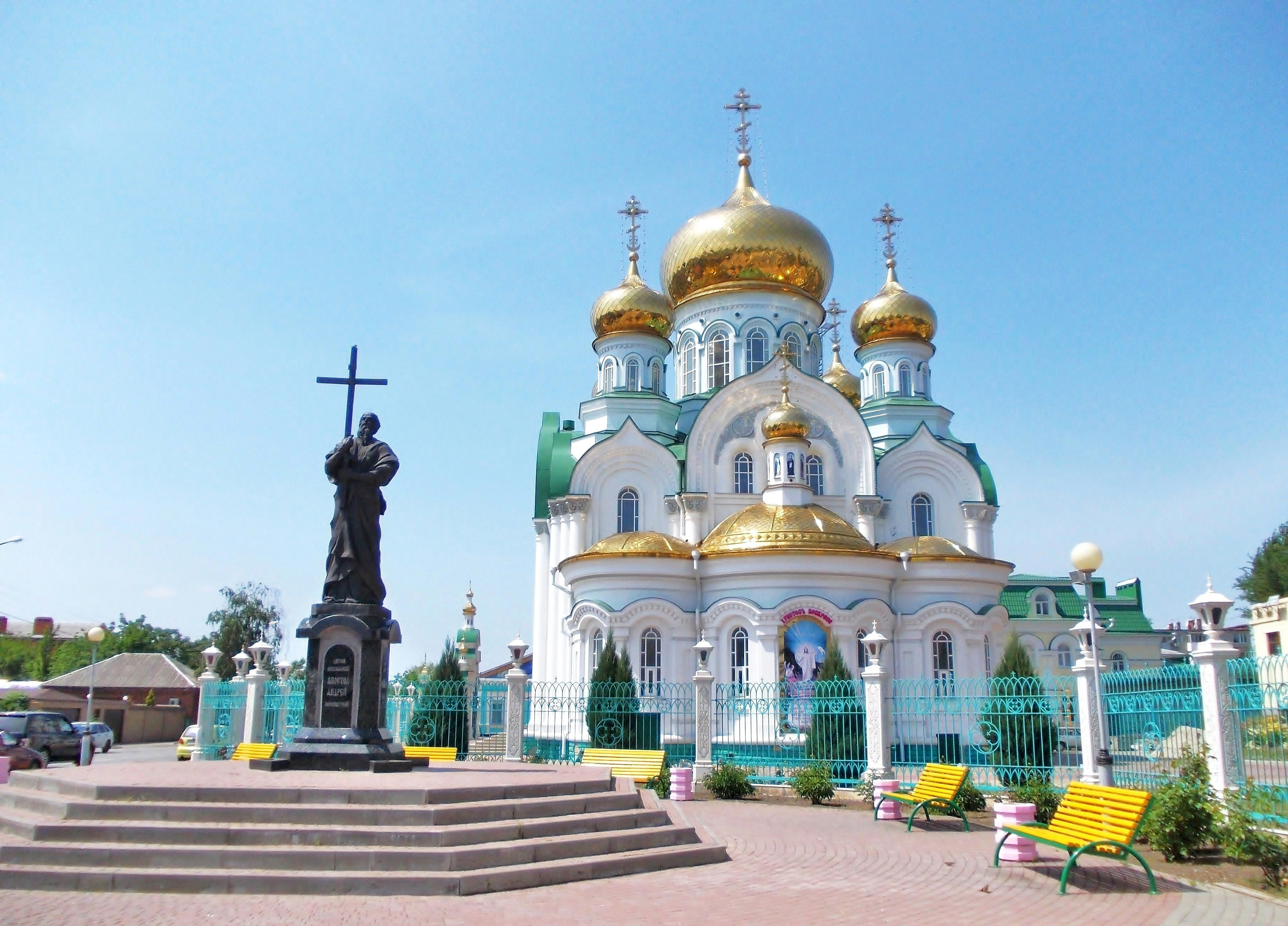 Батайск. Свято-Троицкий храм